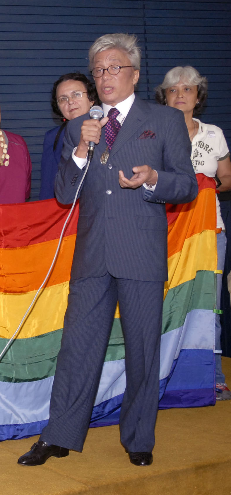 O estilista, apresentador de televisão e político brasileiro Clodovil Hernandes no lançamento de uma frente parlamentar pela Cidadania de Gays, Lésbicas, Bissexuais, Travestis e Transexuais.